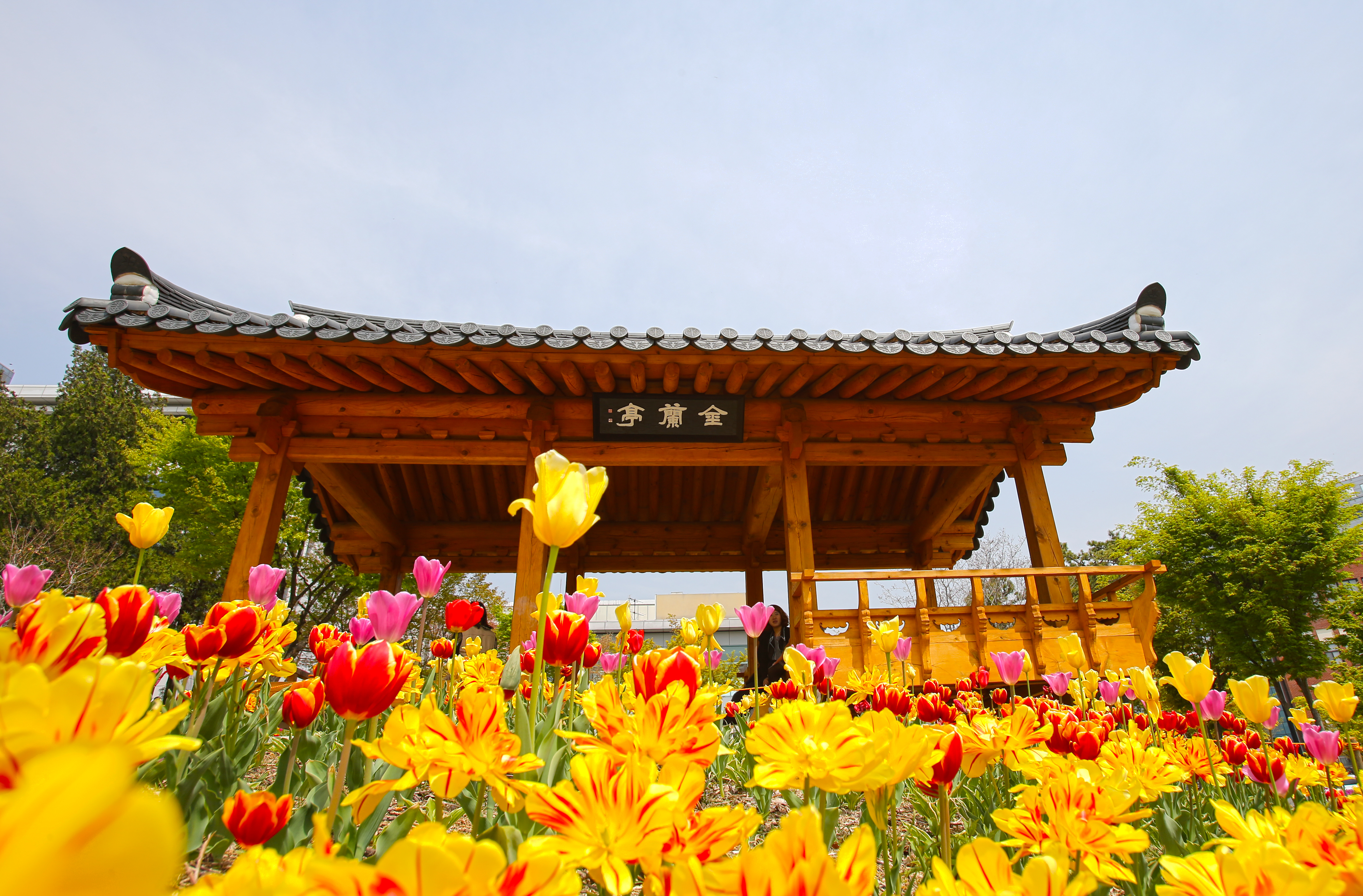 도서관 앞 금난정의 봄사진입니다.